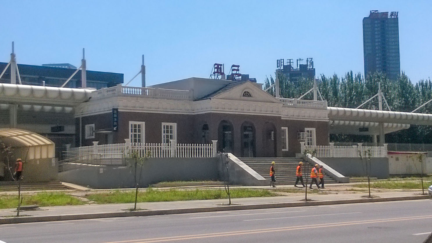 五三乘降所，2008年沈抚城际铁路改造中新建。